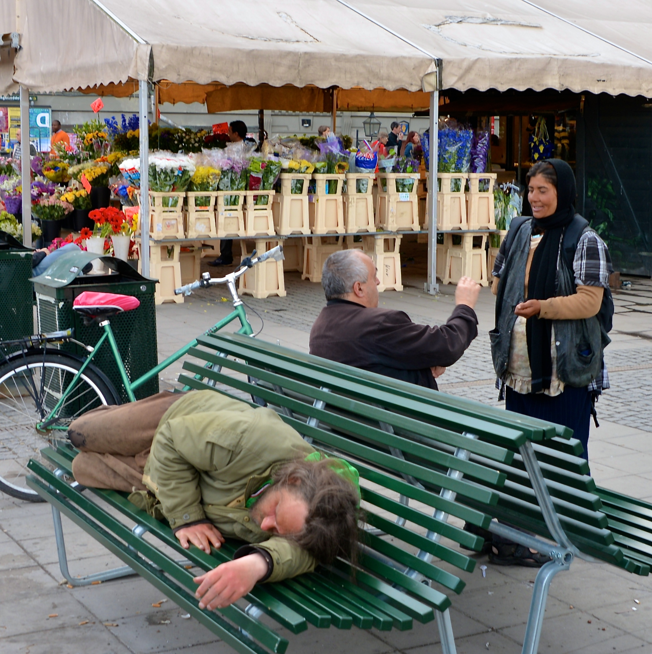 Sveriges nationaldag den 6 juni 2014 i Stockholm.